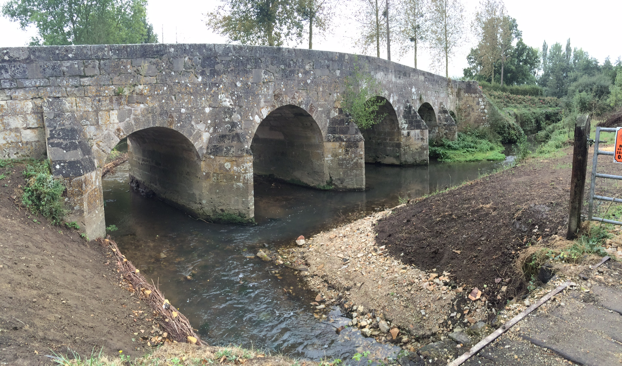 Pont légèrement en dos d'ane et en courbe, enjambant la rivière de l'Huisne, construit en 1610 à l'initiative de Pierre de Catinat, Seigneur de Mauves. Inscrit à l'inventaire des monuments historiques depuis 1939